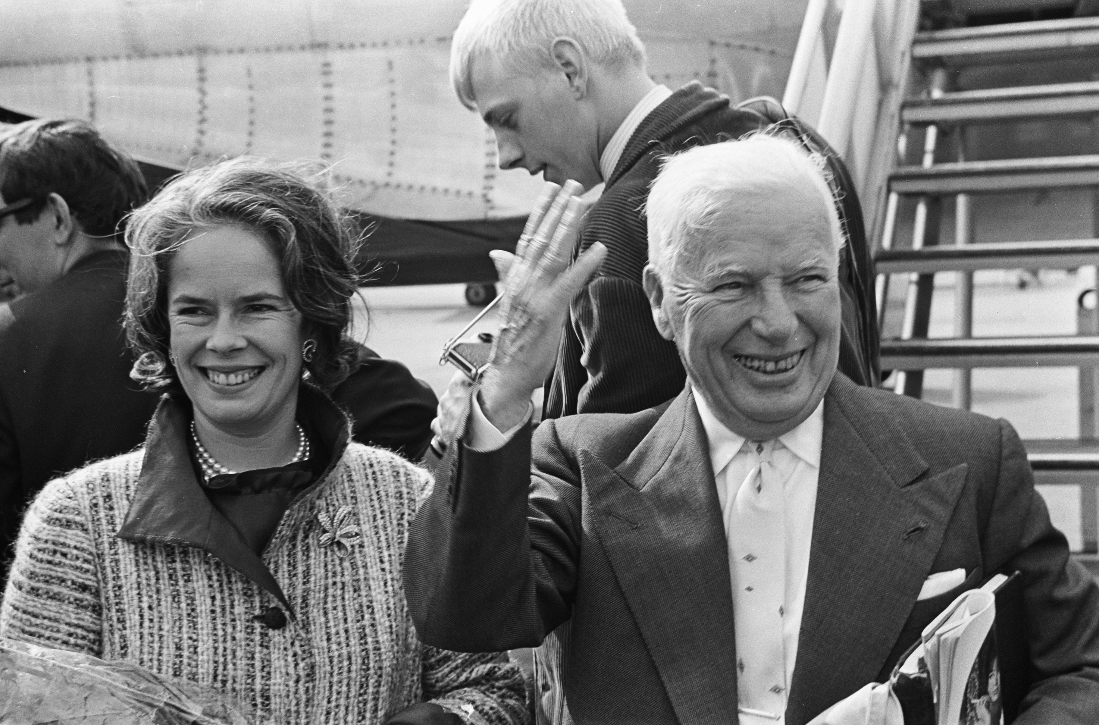 Collectie / Archief : Fotocollectie Anefo Reportage / Serie : Aankomst van acteurs Charlie Chaplin en Peter Ustinov en hun echtgenotes op Schiphol Beschrijving : Aankomst Charlie Chaplin en echtgenote Oona O'Neill Datum : 23 juni 1965 Locatie : Noord-Holland, Schiphol Trefwoorden : aankomsten, acteurs Persoonsnaam : Chaplin, Charlie, Neill, Oona O' Fotograaf : Joost Evers / Anefo Auteursrechthebbende : Nationaal Archief Materiaalsoort : Negatief (zwart/wit) Nummer archiefinventaris : bekijk toegang 2.24.01.05 Bestanddeelnummer : 917-8946